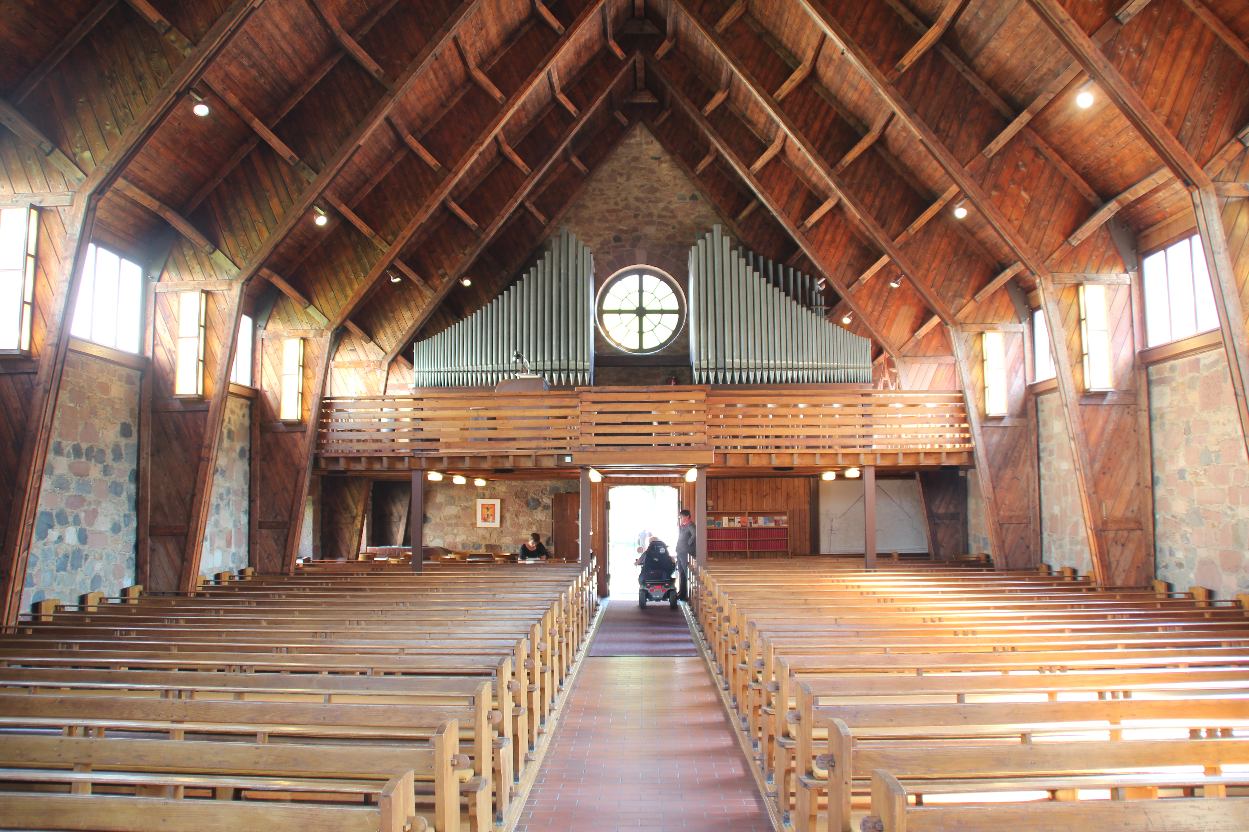 Innenraum der Pankratiuskapelle, Gießen, Hessen, Deutschland